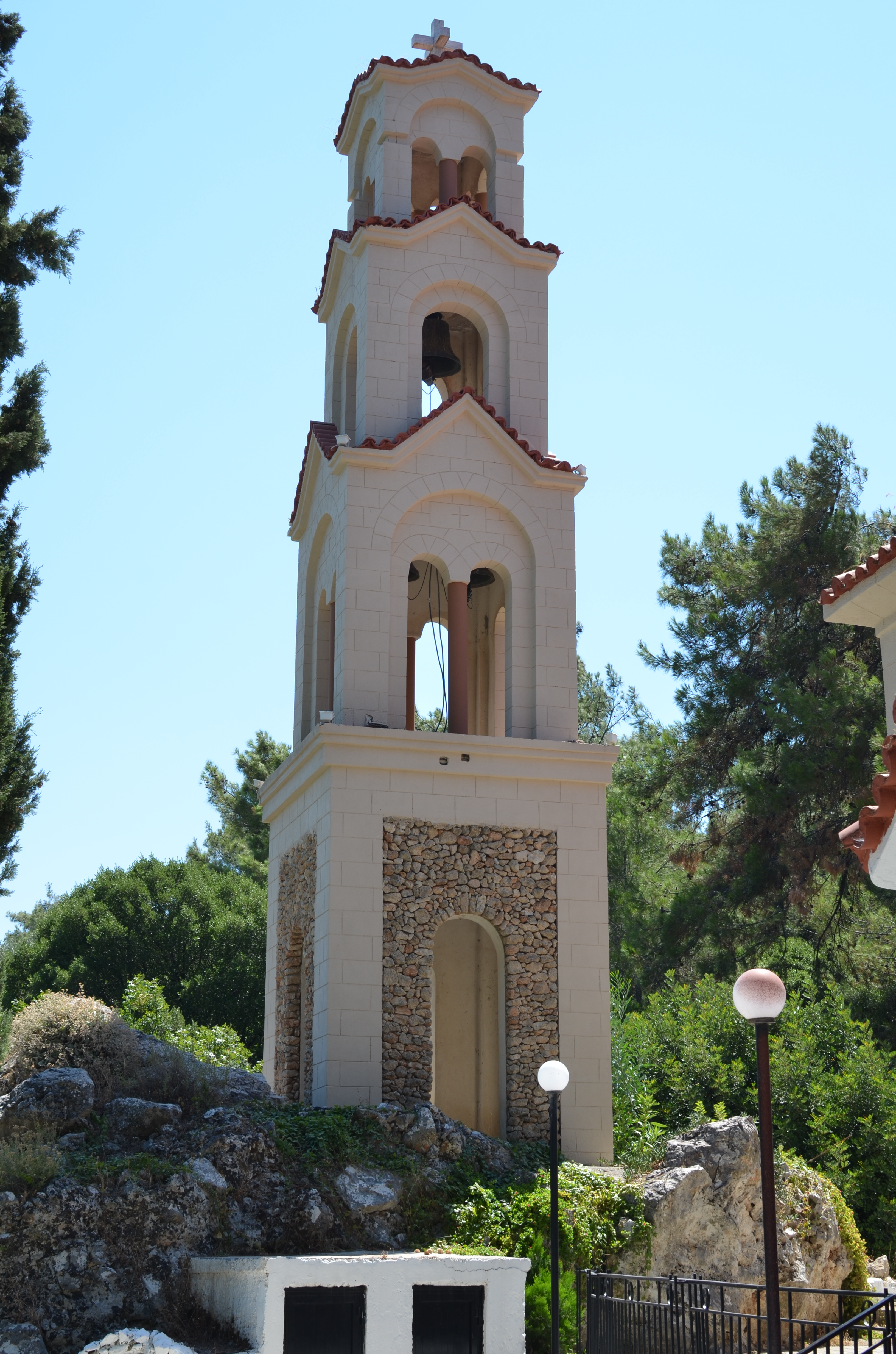 Věž kostela Agios Nektarios poblíž Archipoli na ostrově Rhodos